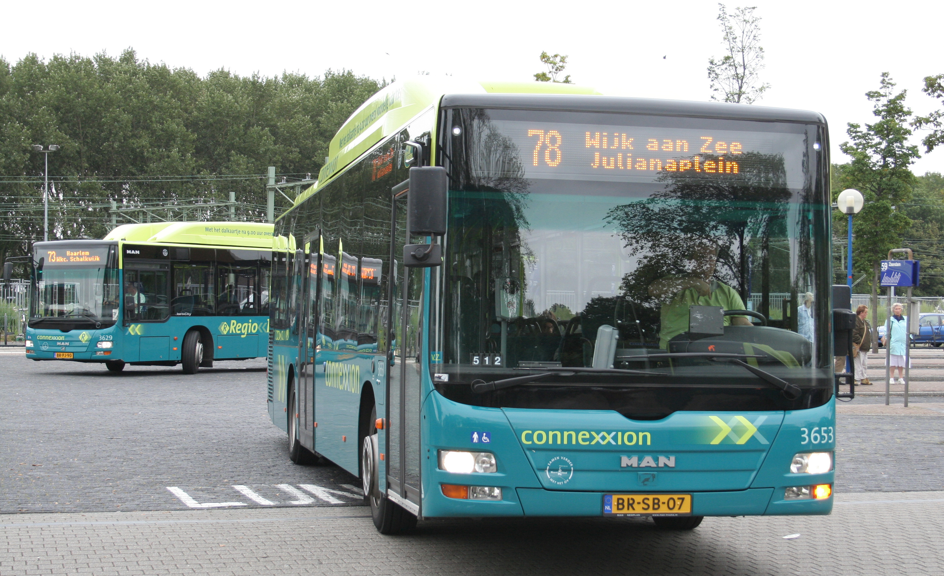 Gasbus van Connexxion in Beverwijk, een MAN Lions's City CNG.